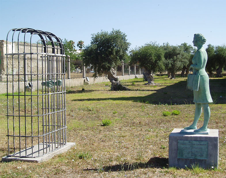 Estatua a los presos del Penal del Puerto encarcelados por motivos políticos.